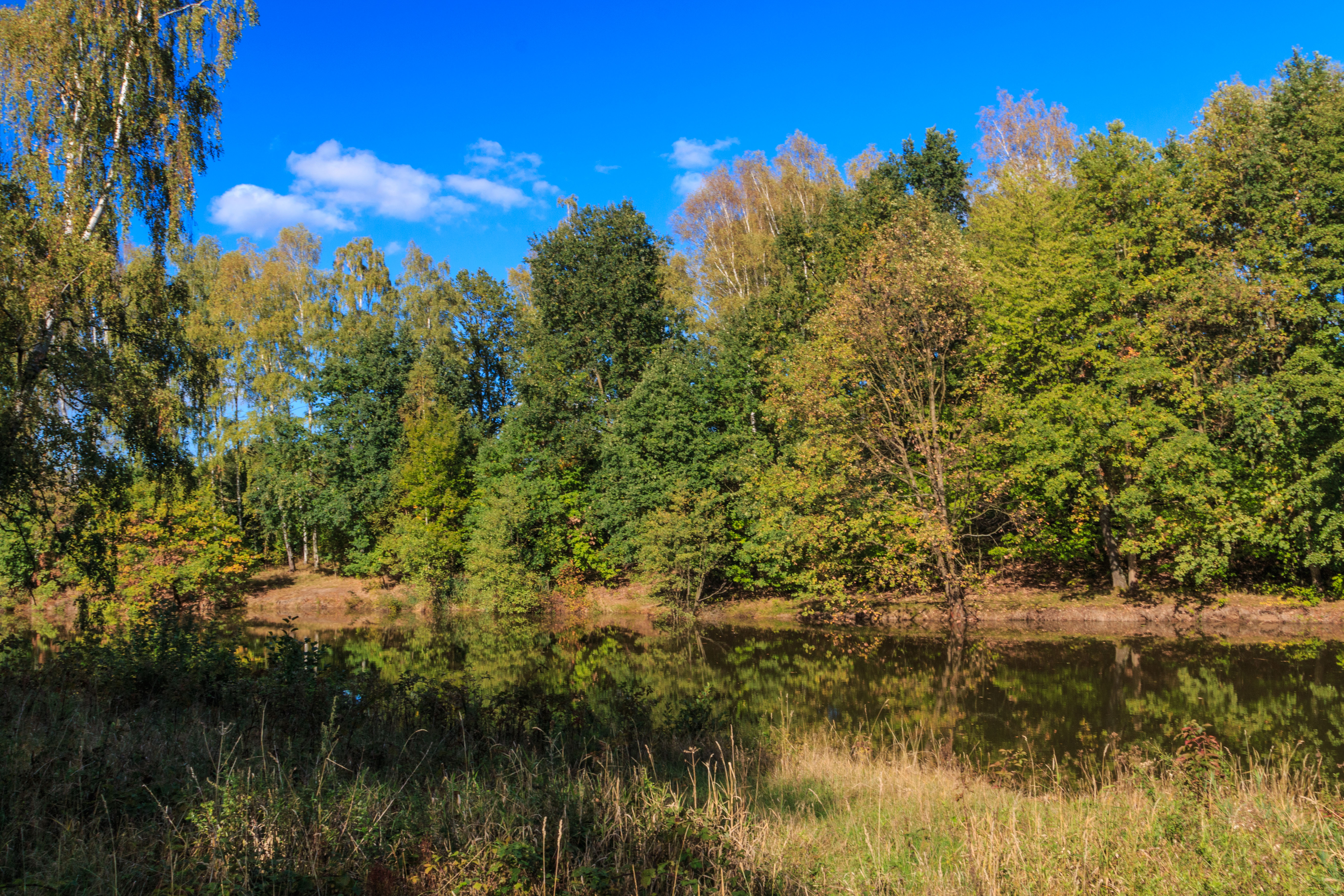 Pod Červeným rybníkem u Pihelu Project: Vodstvo